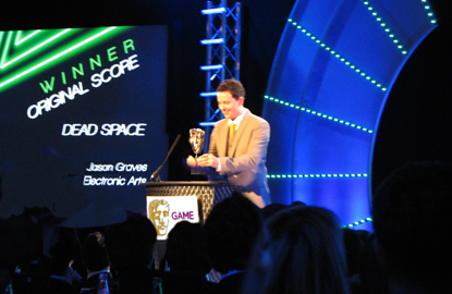 Jason Graves, durante los Premios de Cine de la Academia Británica de 2009, recibiendo el premio a la Mejor Banda Sonora Original, de igual forma, recibió en esa misma entrega de premios, el reconocimiento al Mejor Uso de Audio.